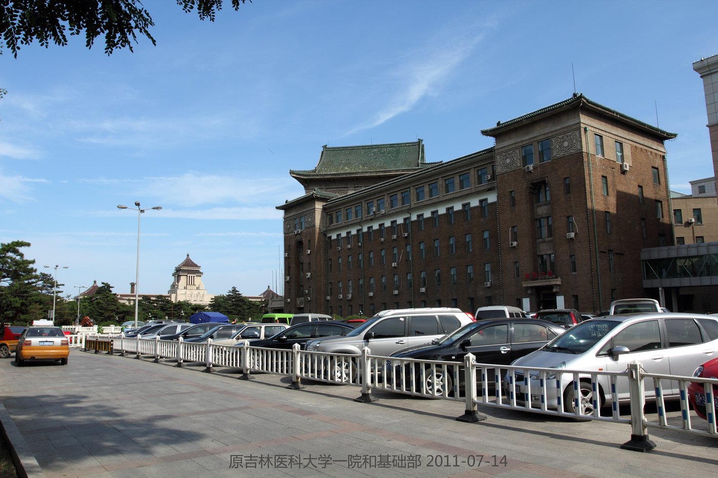 原吉林医科大学一院和基础部